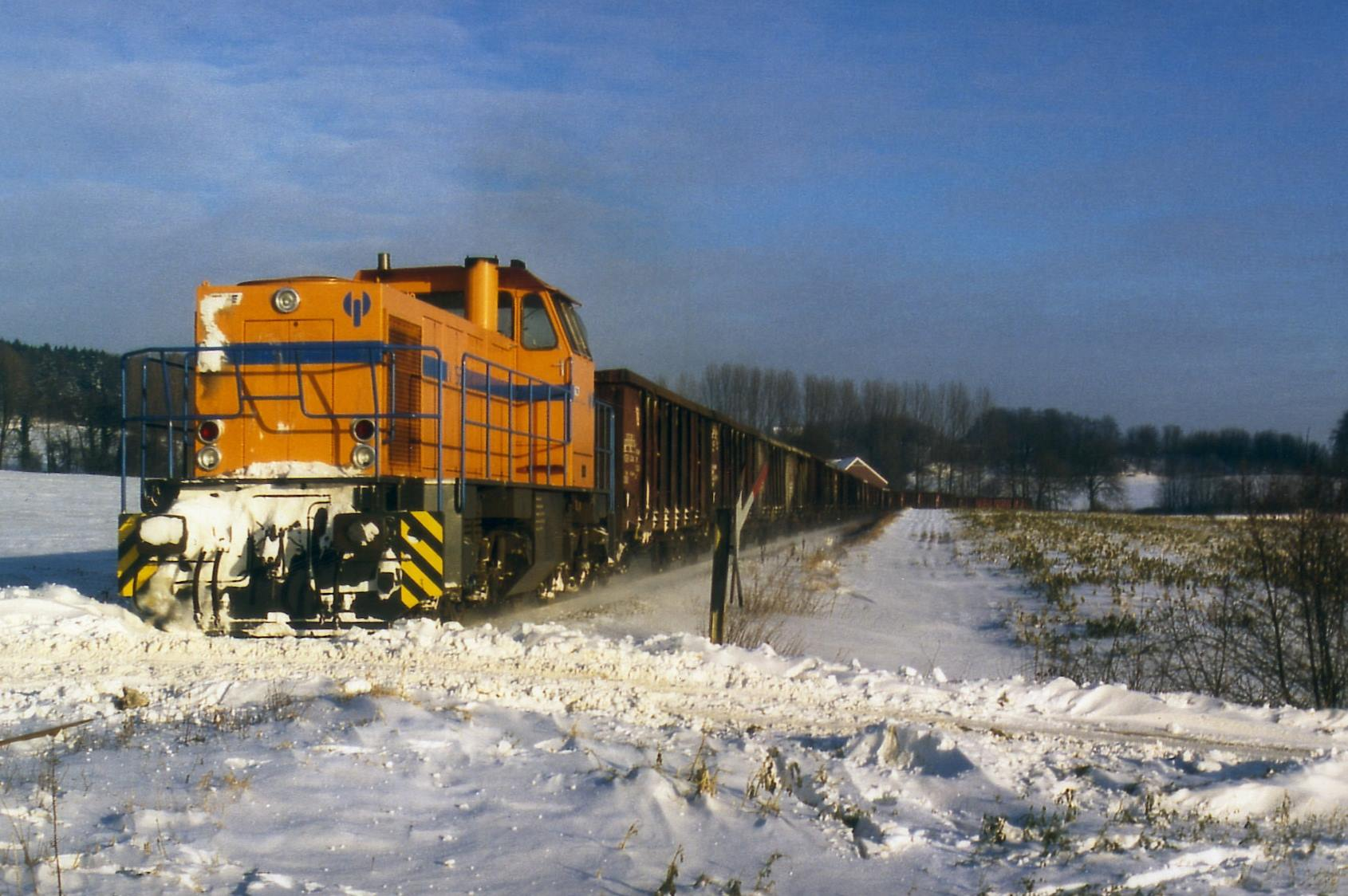 V 157 der TWE in ursprünglichem DEG-Design mit Schrottzug Paderborn-Hanekenfähr bei Bad Iburg-Ostenfelde am 05.01.1997